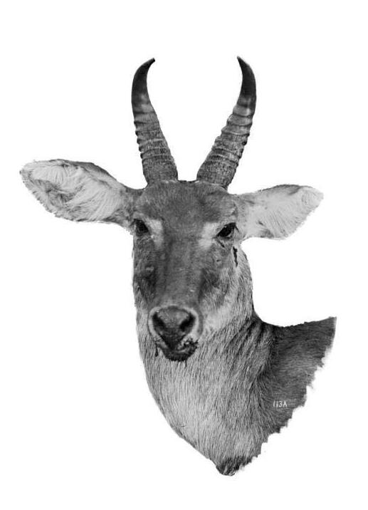 Riedbock, Kopfbild